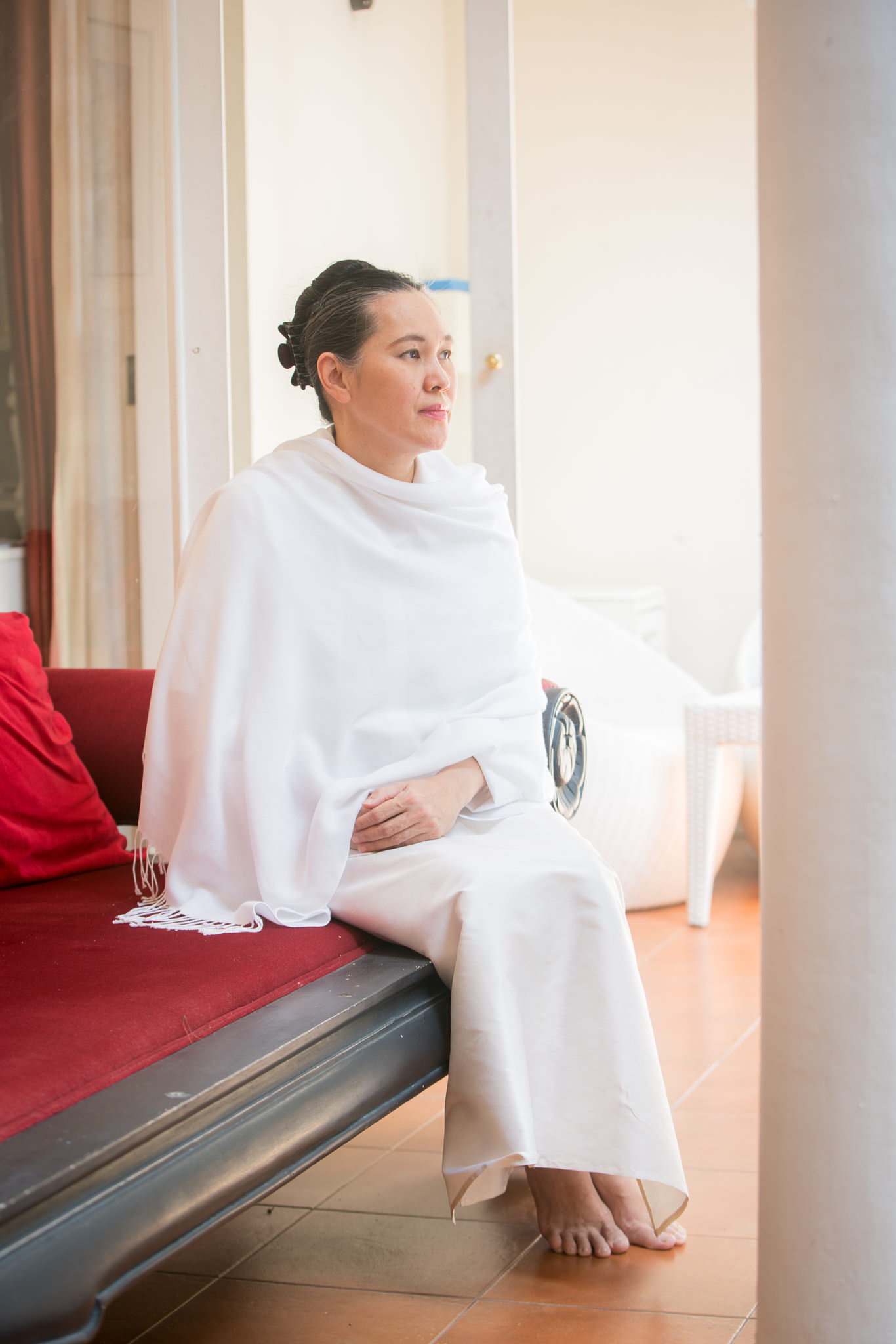 อาจารย์อัจฉราวดี วงศ์สกล